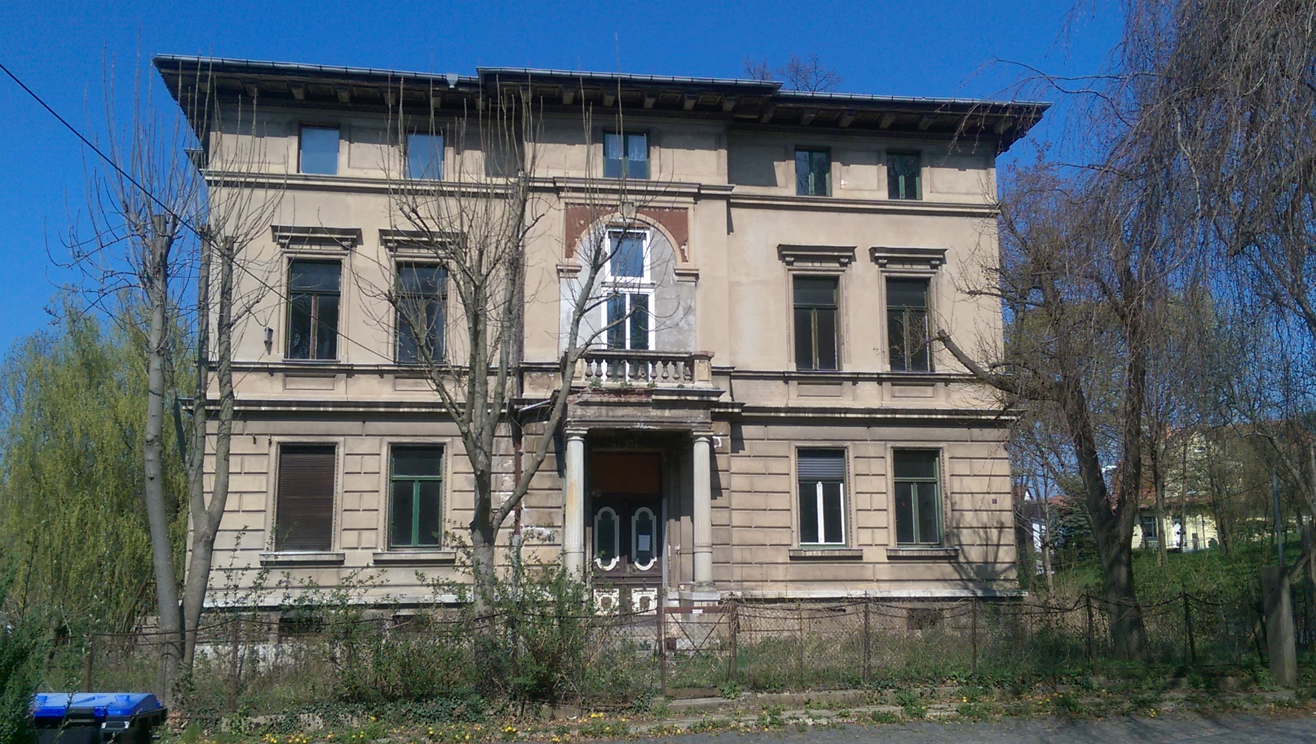 Villa Deinhardt in (Erfurt-) Vieselbach, Brauhausstraße 2; erbaut 1897; unter Demnkmalschutz